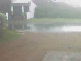 Descrição Chuva em Canoas, no bairro Igara.